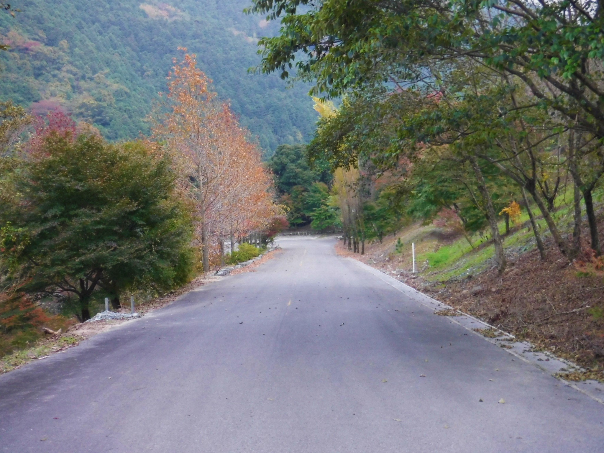 石鎚芸術村チロルの正面道路